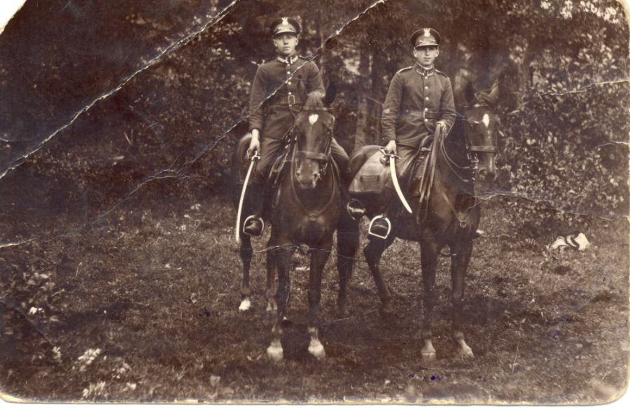 żołnierze 20 szwadronu Korpusu Ochrony Pogranicza